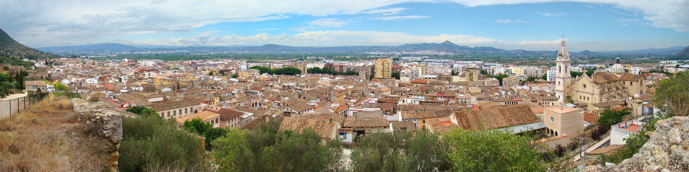 Xàtiva, País Valencià, Espanya.